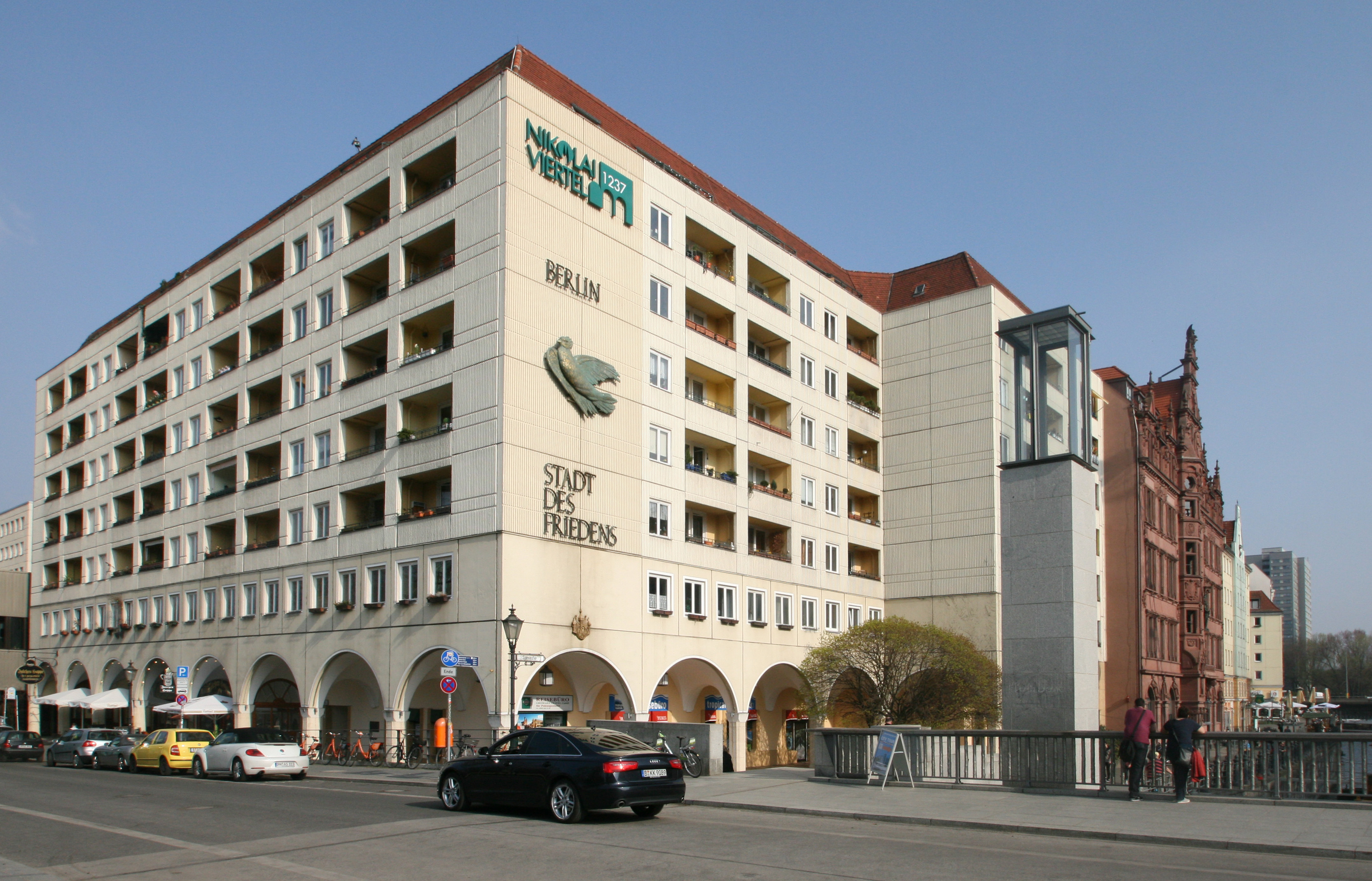 Rathausstraße/Ecke Spreeufer in Berlin-Mitte (Nikolaiviertel)